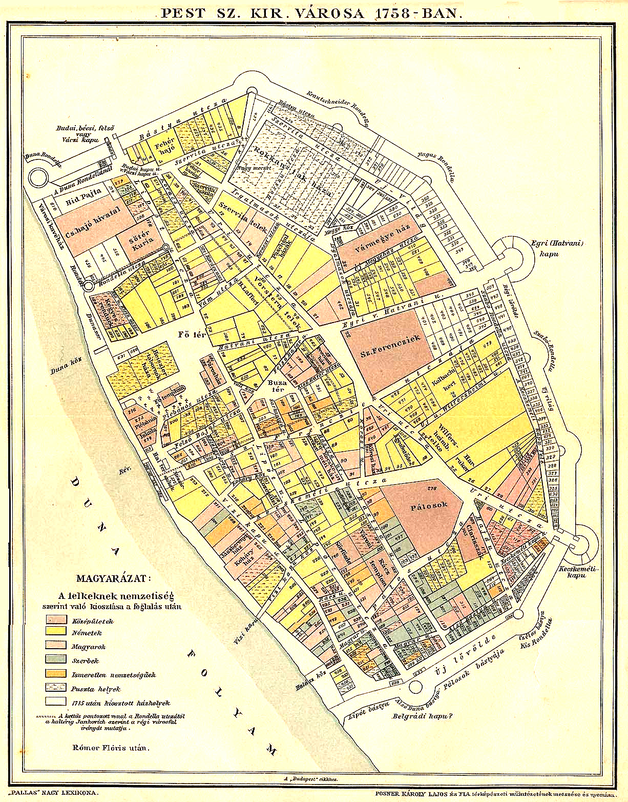 Pest szabad királyi város alaprajza 1758- ban, rézmetszetű Pest-térkép